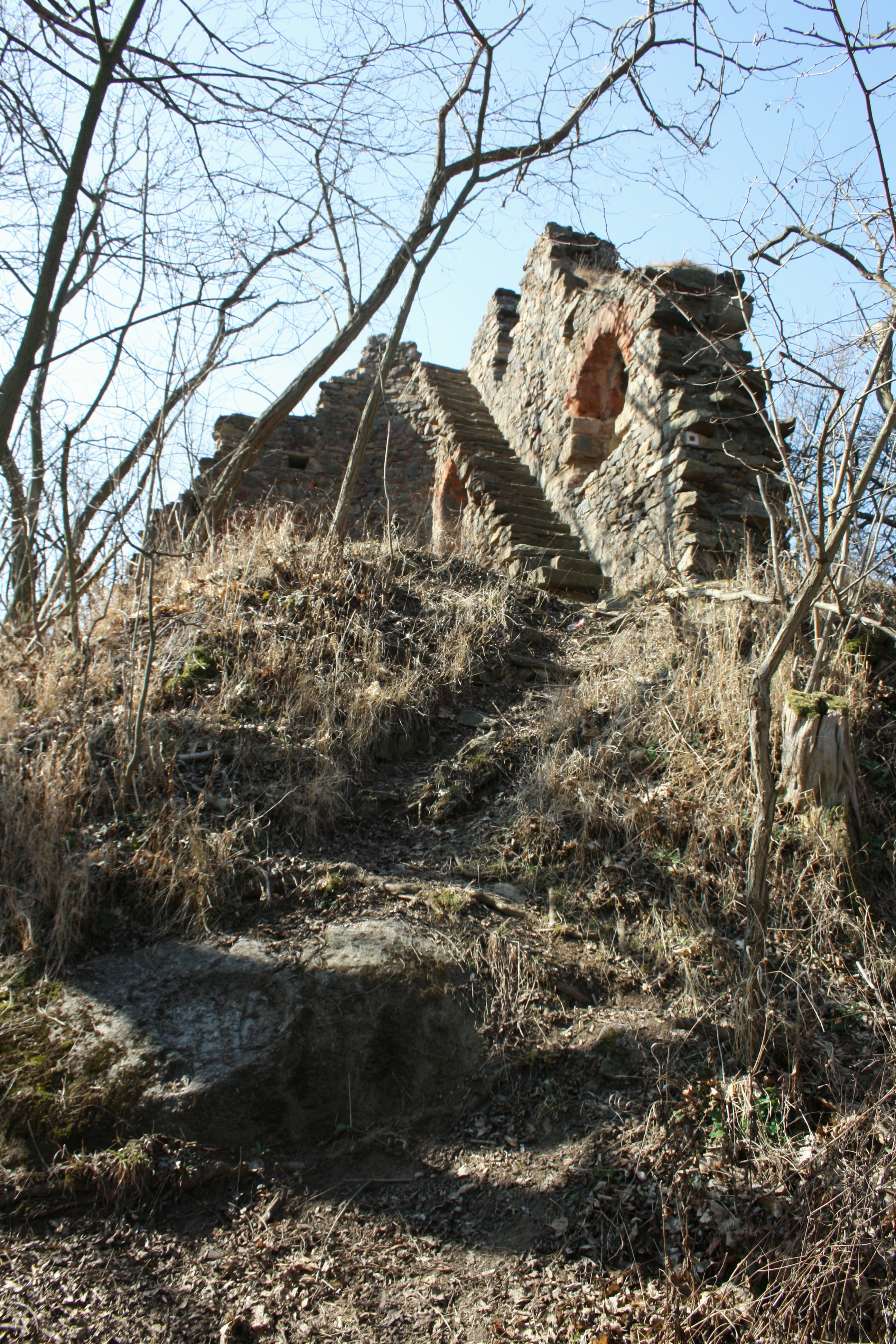 Háj Petra Bezruče, zřícenina